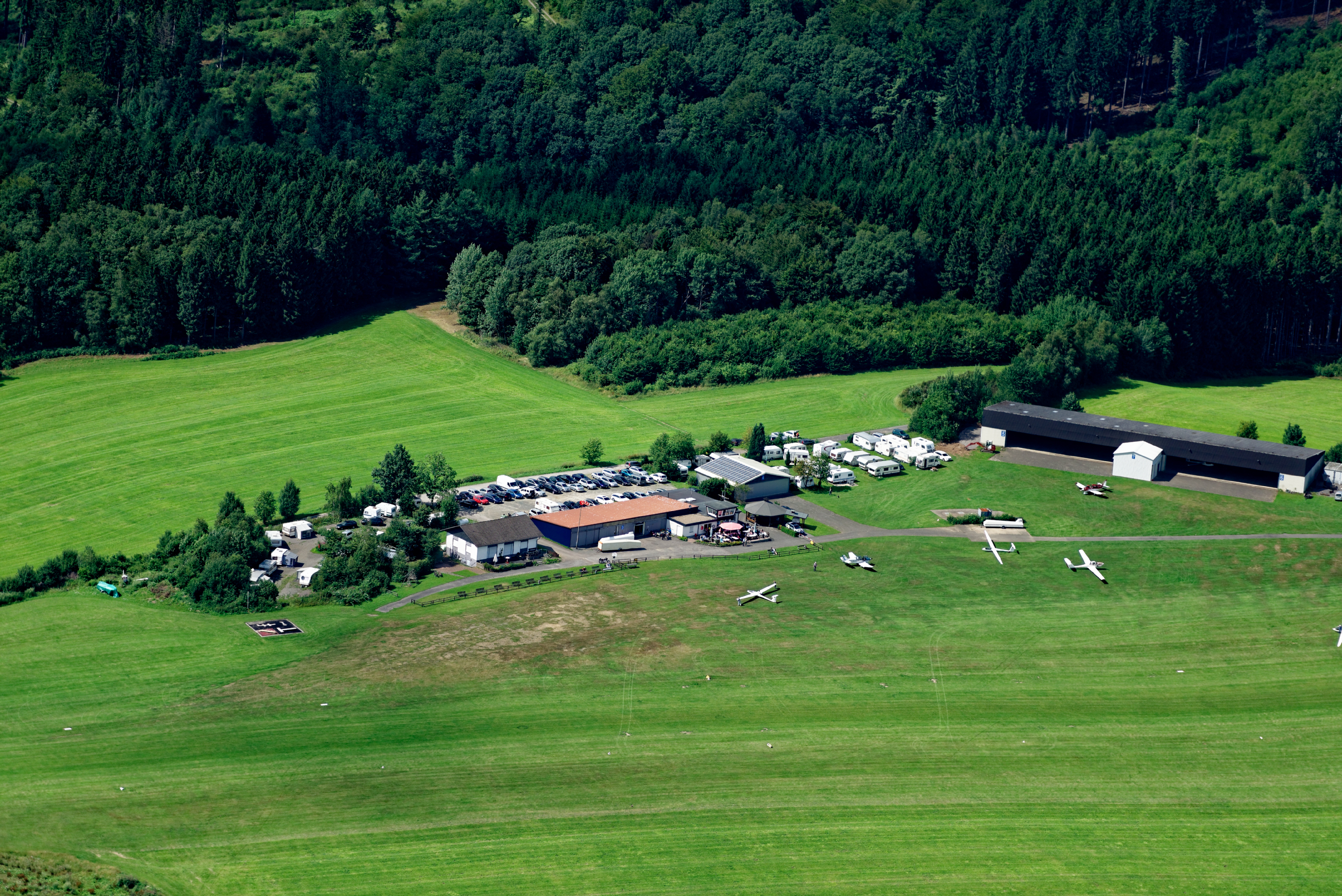 Luftaufnahme: Flugplatz Bergneustadt Auf dem Dümpel, Nordrhein-Westfalen